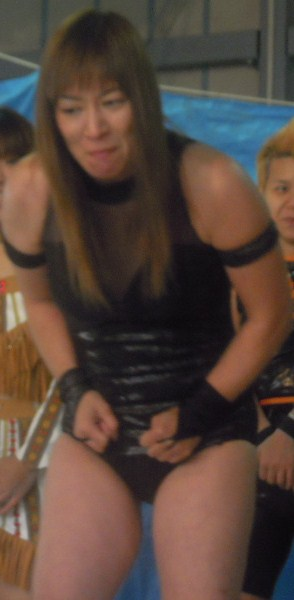 ジャガー横田 2011年1月10日JWP道場マッチ 投稿者撮影